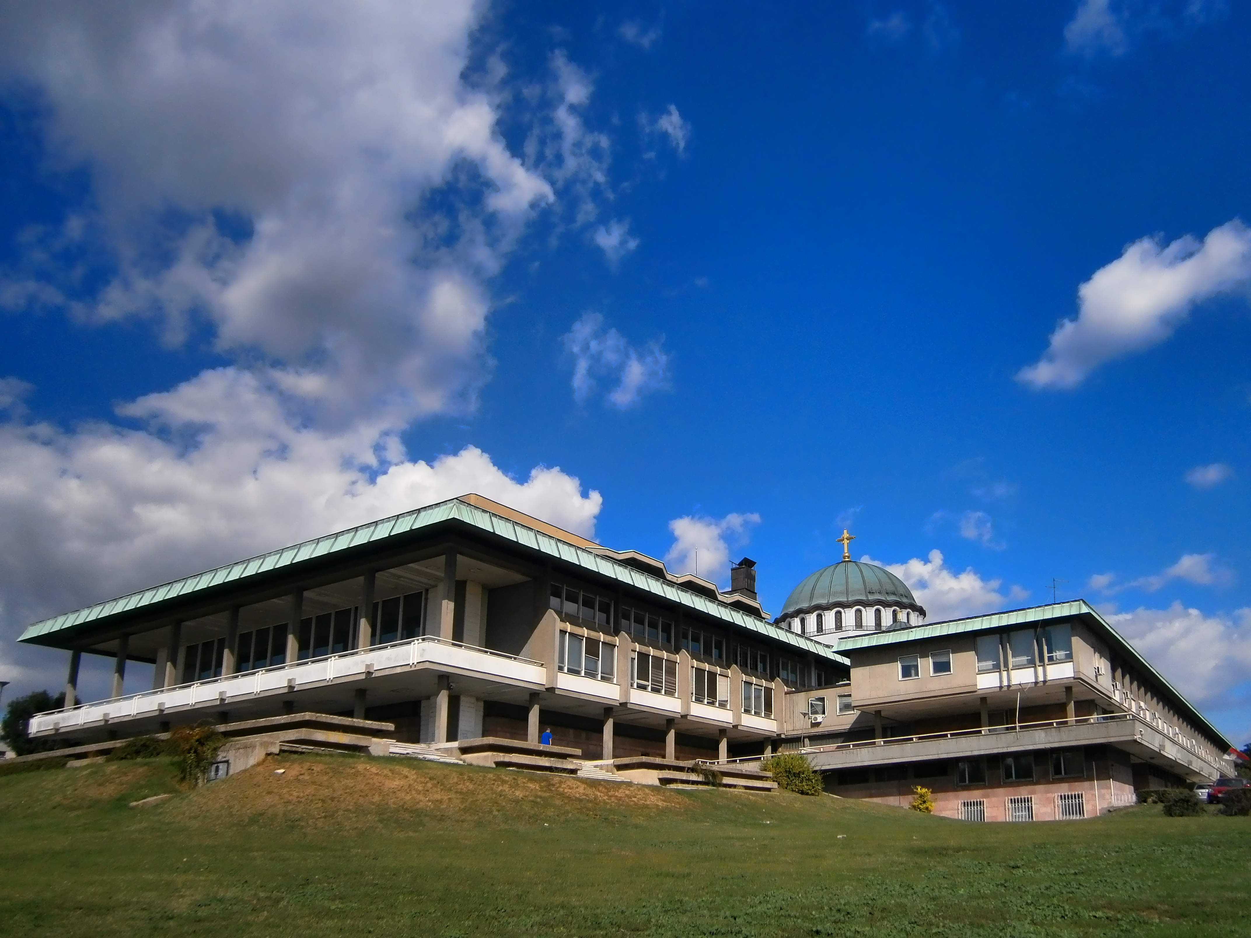 Постојећа зграда Народне библиотеке на Врачару изграђена је 1973. године. Зграду је пројектовао архитекта Иво Куртовић и убраја се у споменике културе.